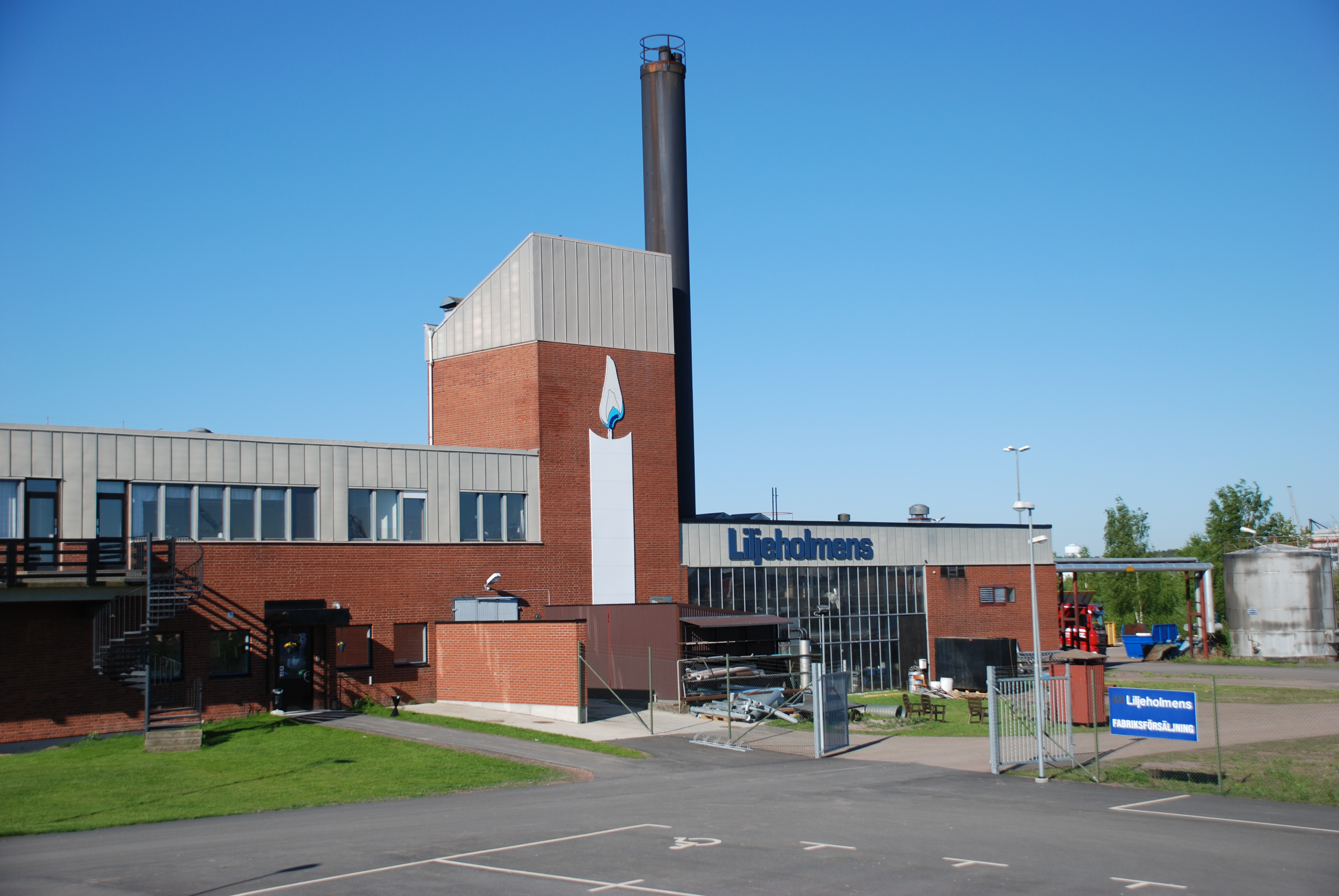 Liljeholmens stearinfabrik vid hamnen i Oskarshamn